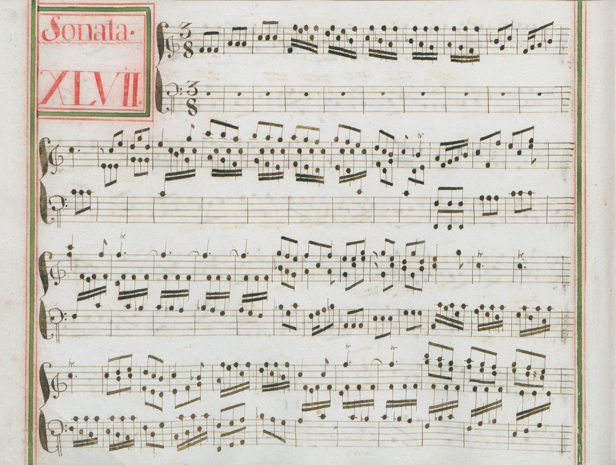 La sonate K. 82, telle qu'elle se présente dans le manuscrit de Venise, volume XIV no. 47.